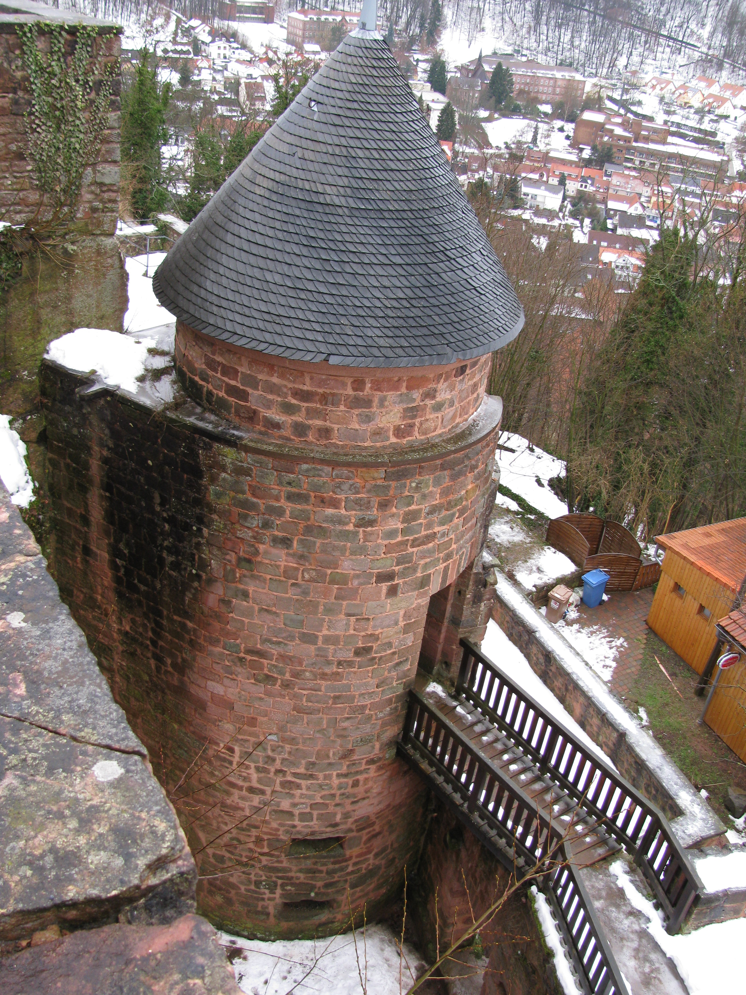 Treppenturm der Burg Nanstein in Rheinland Pfalz. Er steht im Nordwesten der Kernburg. 1969 wurde er wieder aufgemauert, nur der untere Bereich ist original.